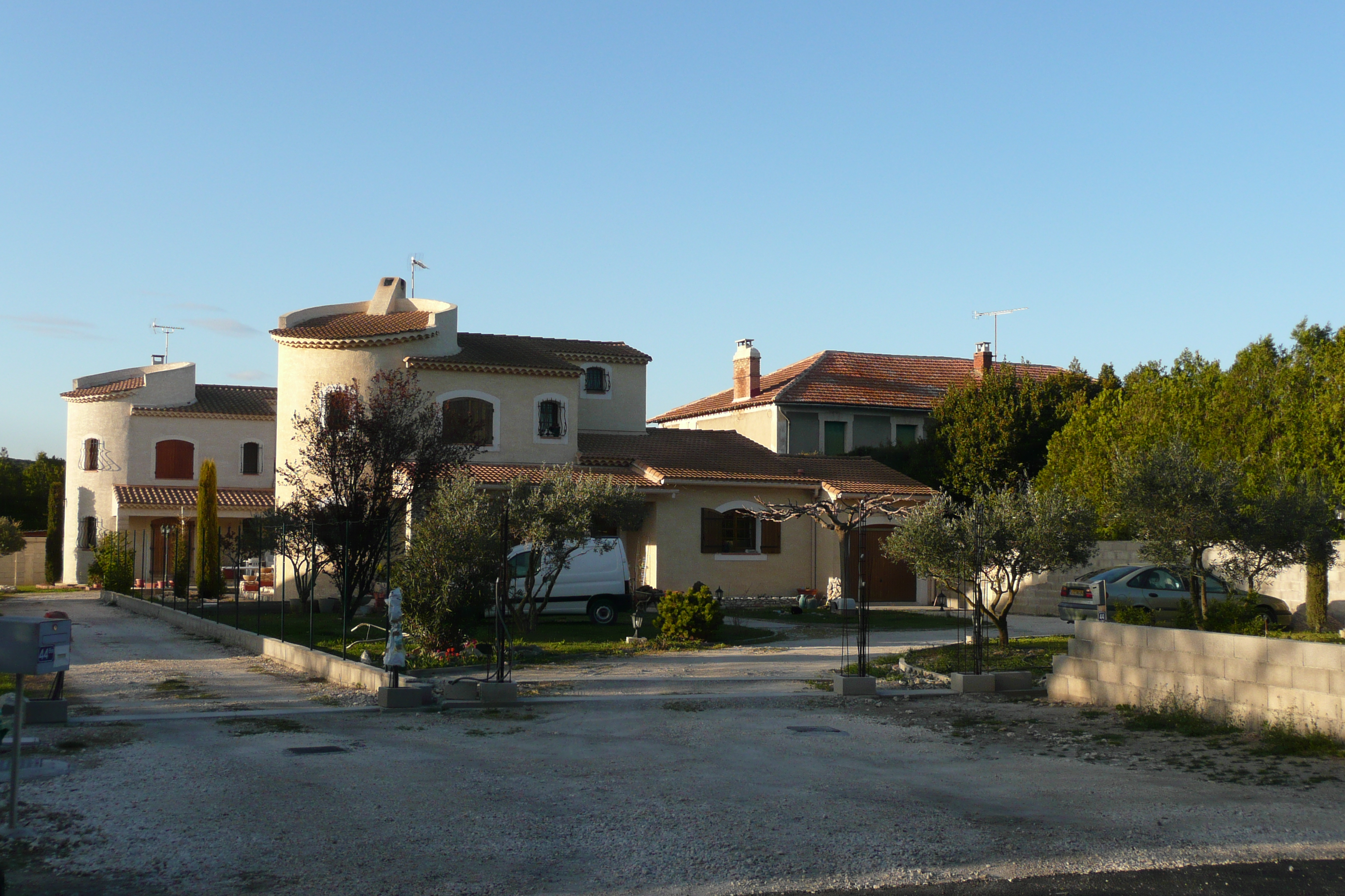 Périphérie du village de Caumont sur Durance.